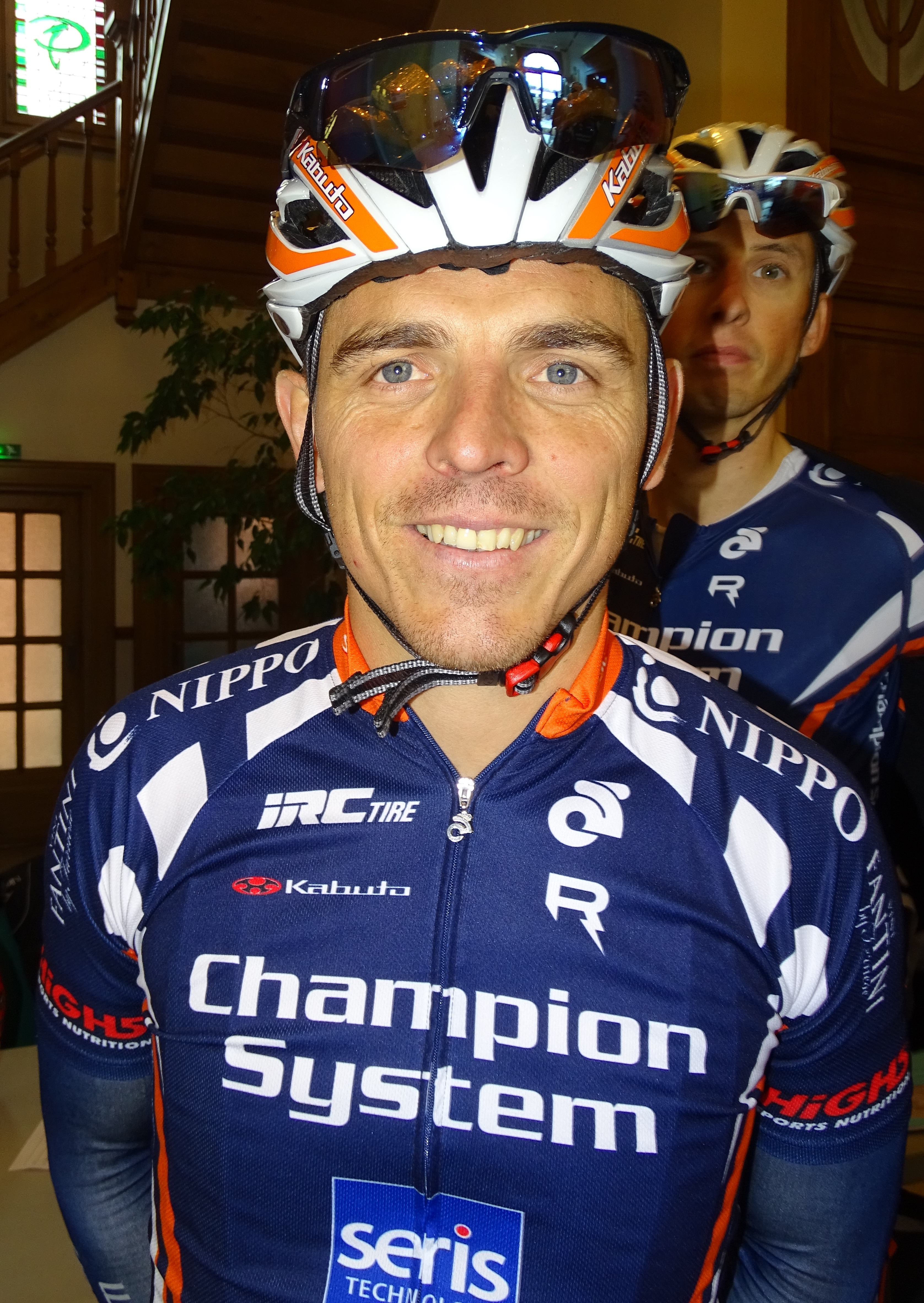 Reportage réalisé le dimanche 26 juillet à l'occasion du départ et de l'arrivée du Grand Prix de la ville de Pérenchies 2015 à Pérenchies, Nord, Nord-Pas-de-Calais, France.